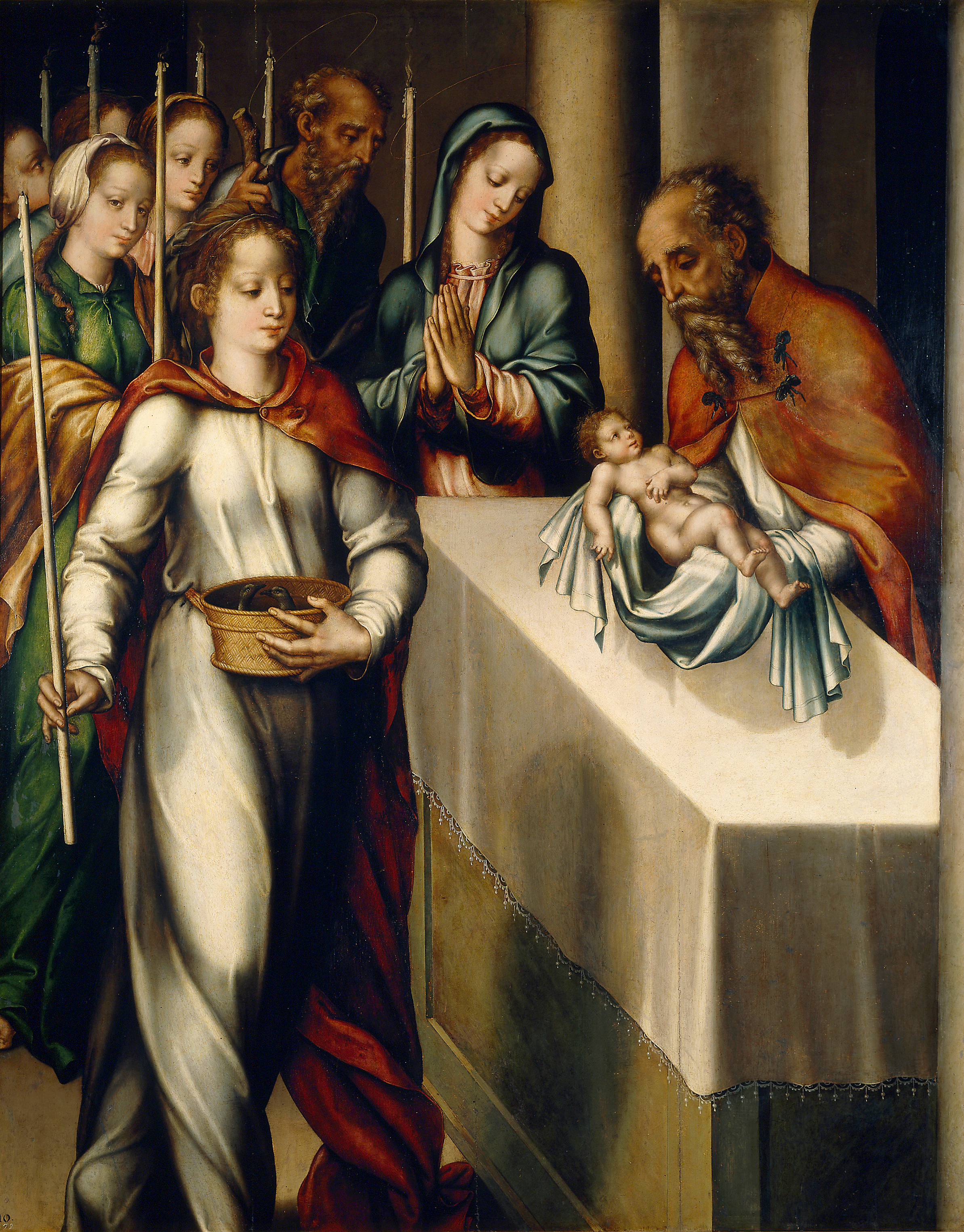 La obra representa al mismo tiempo la purificación de la Virgen María en el Templo de Jerusalén y la presentación del Niño Jesús en dicho lugar poco después de su nacimiento.